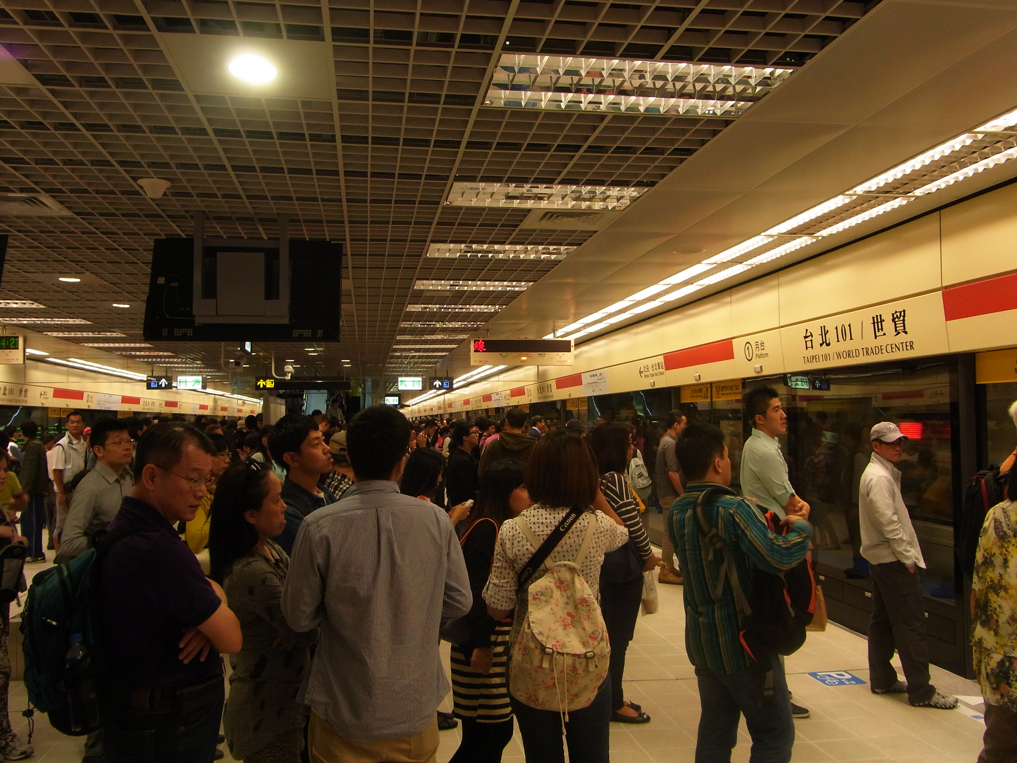 中文（台灣）: 台北捷運台北101/世貿站1號月台。